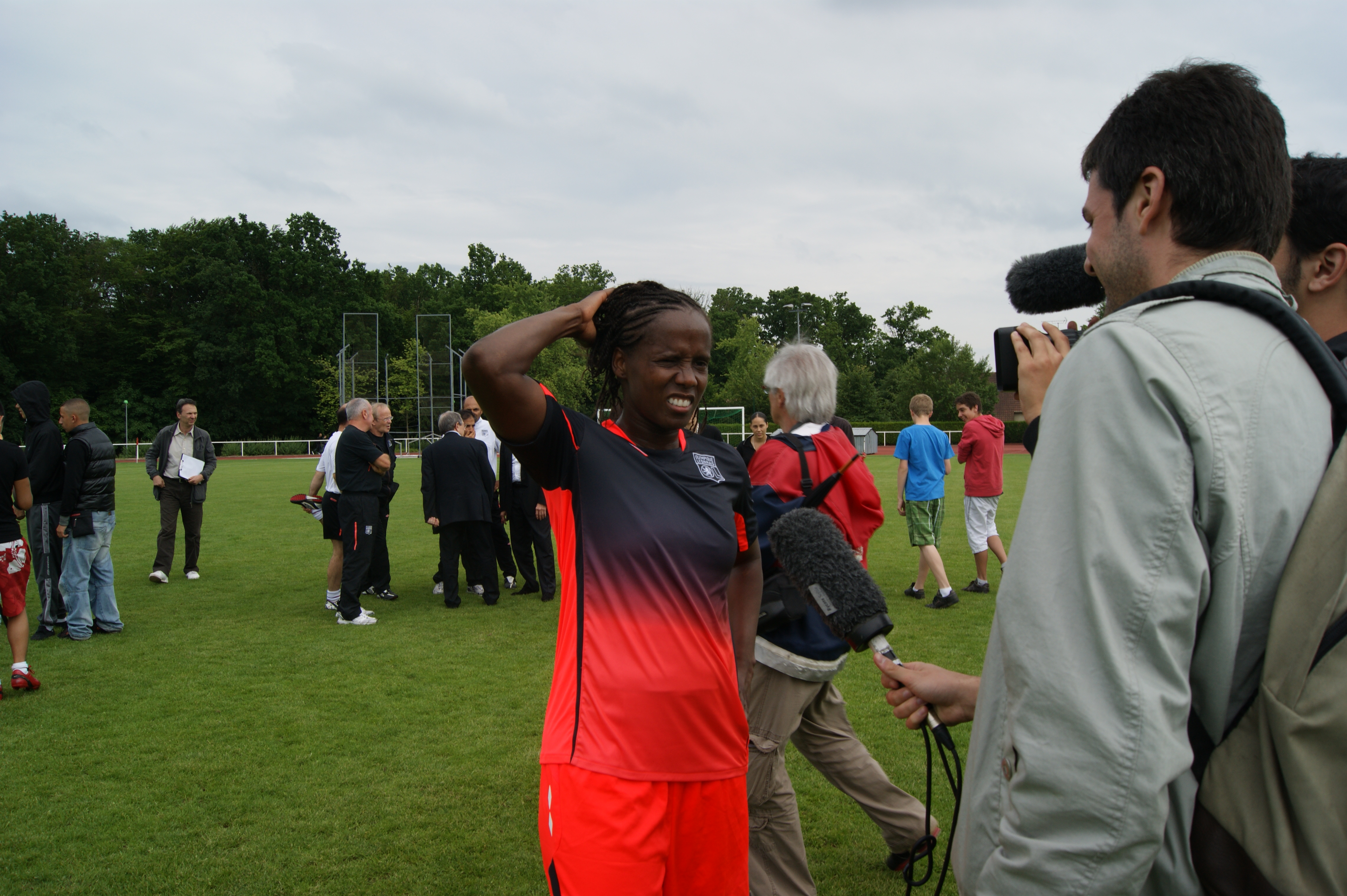 Katia Cilene Teixeira da Silva après le match AS Montigny-le-Bretonneux-Olympique lyonnais à l'occasion de la dernière journée du championnat de france de football féminin 2009-2010.